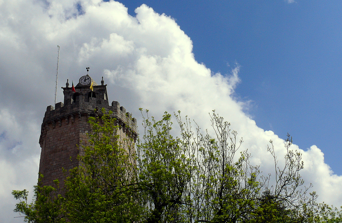 Castelo de Freixo de Espada à Cinta This monument is classified as Monumento Nacional. This file was uploaded for Wiki Loves Monuments in Portugal with the unique identifier 70453.